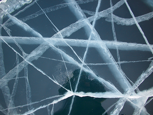 Лёд на озере Байкал (возле п. Листвянка)